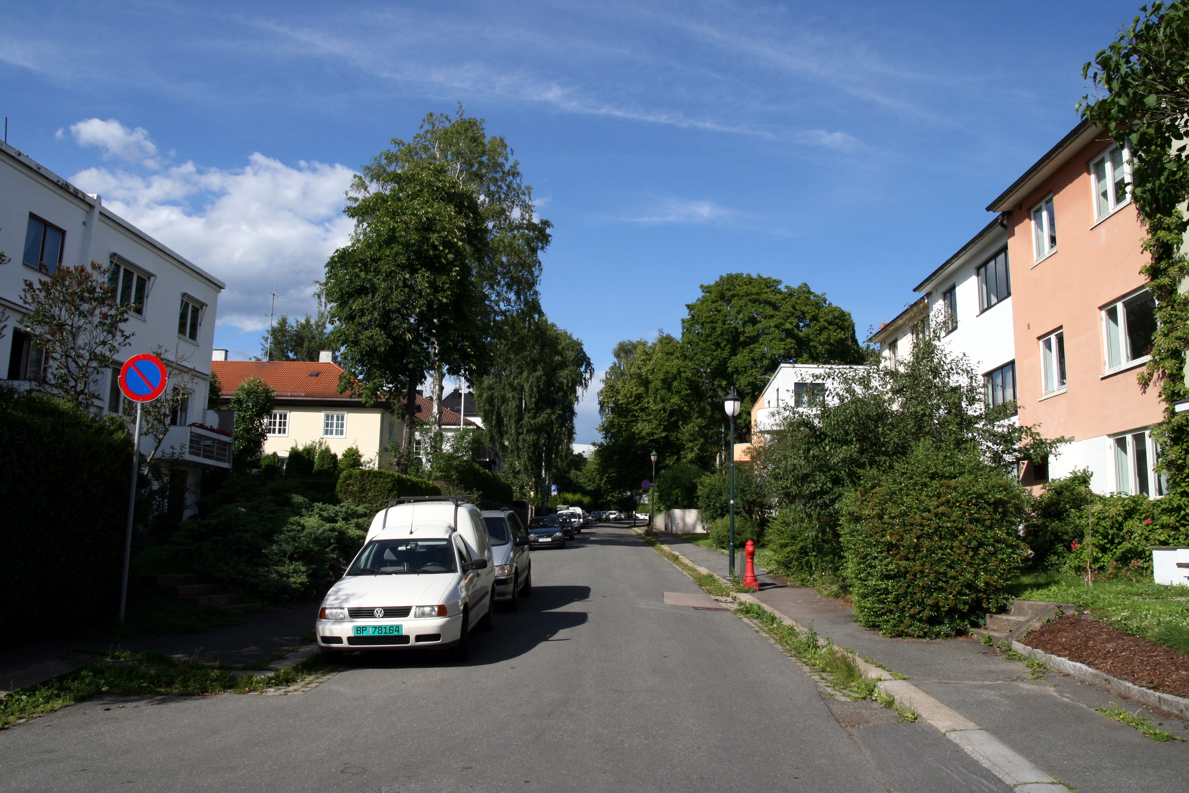 Nobels gate på Skarpsno i Oslo, helt i begynnelsen nede ved jernbanen.